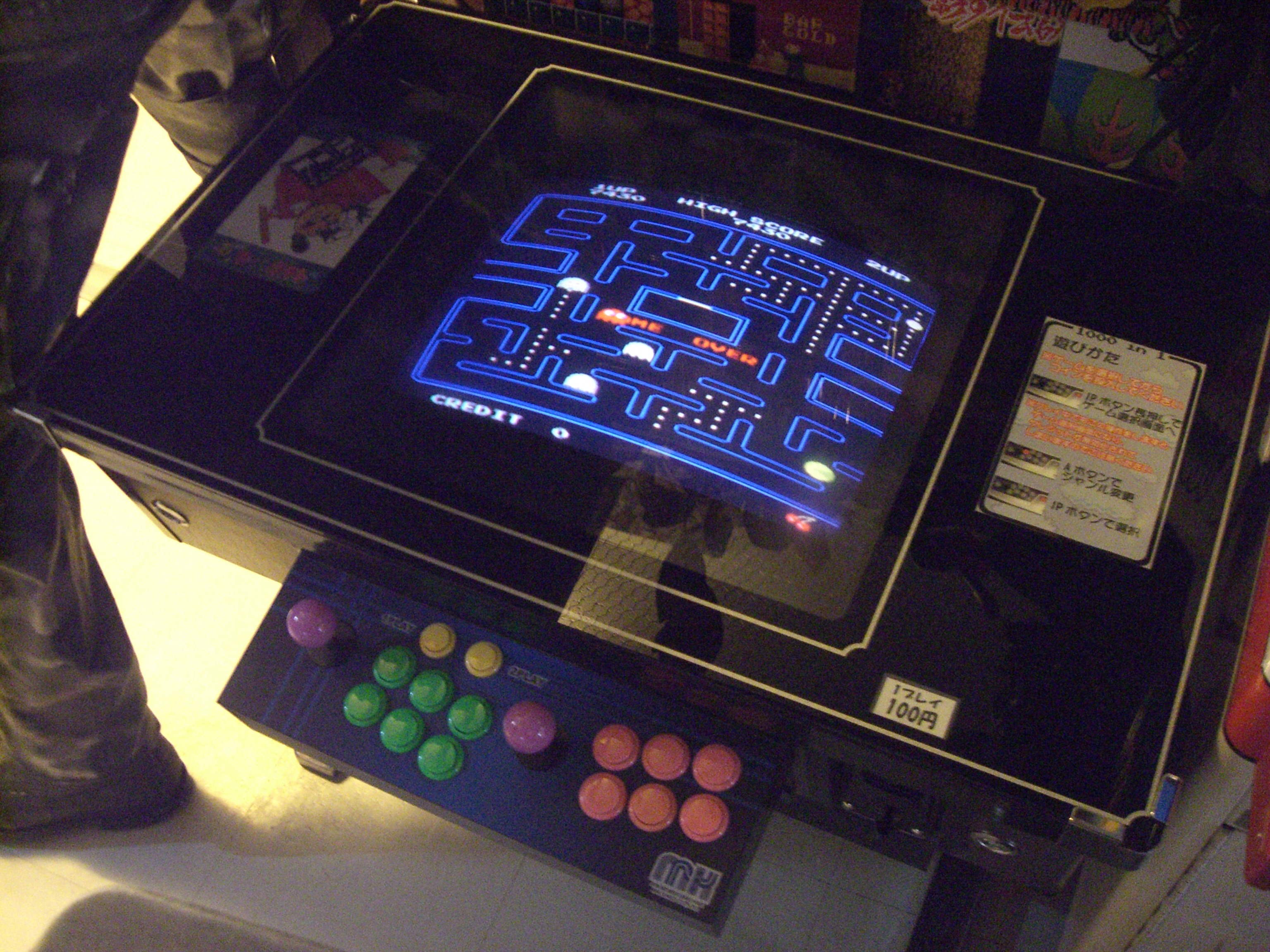 CIMG2437